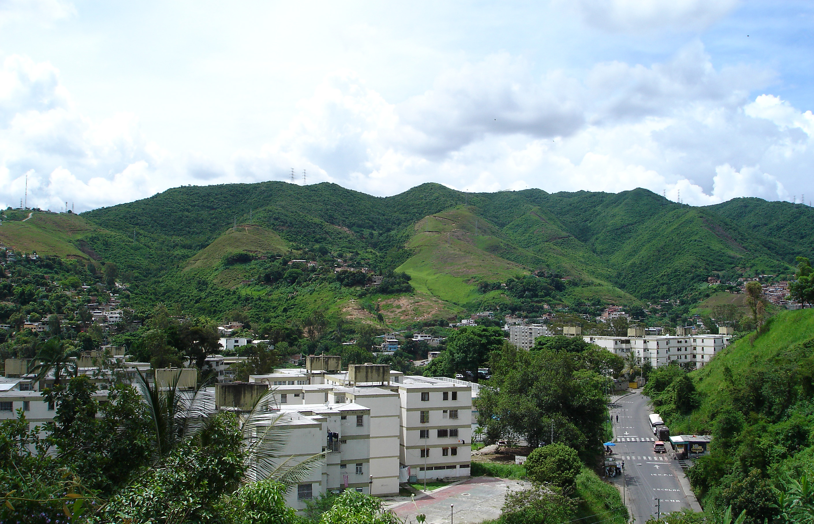 Vista de Caricuao